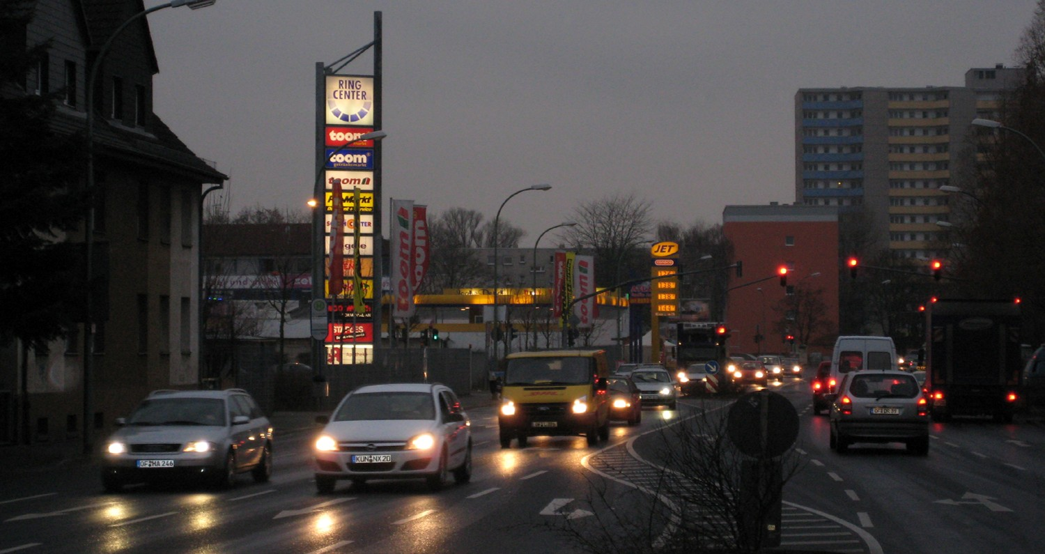 Odenwaldring, Offenbach-Lauterborn